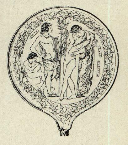 Graverad metallspegel (frånsidan ; Bacchus och Semele samt Apollon), handtaget förkortadt. (Berlin.)